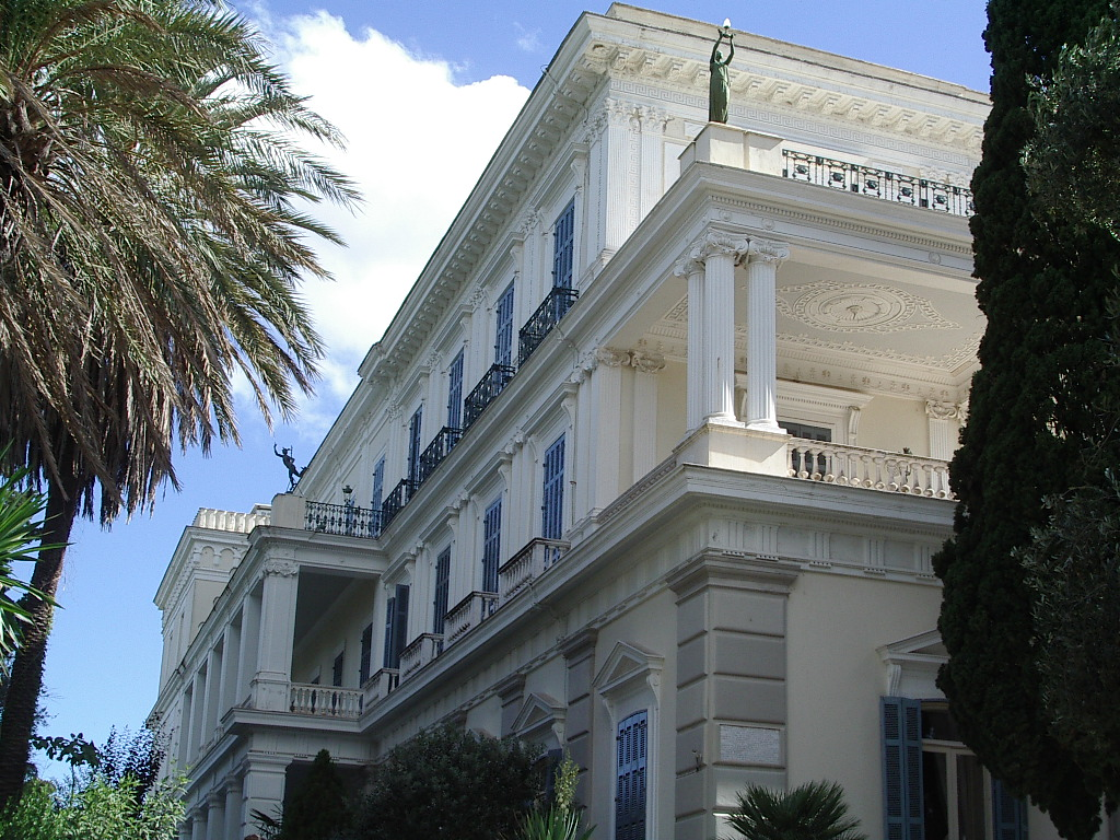 Corfú, palau del Bon repos conegut com palau de Sissi, part devantera, foto propia